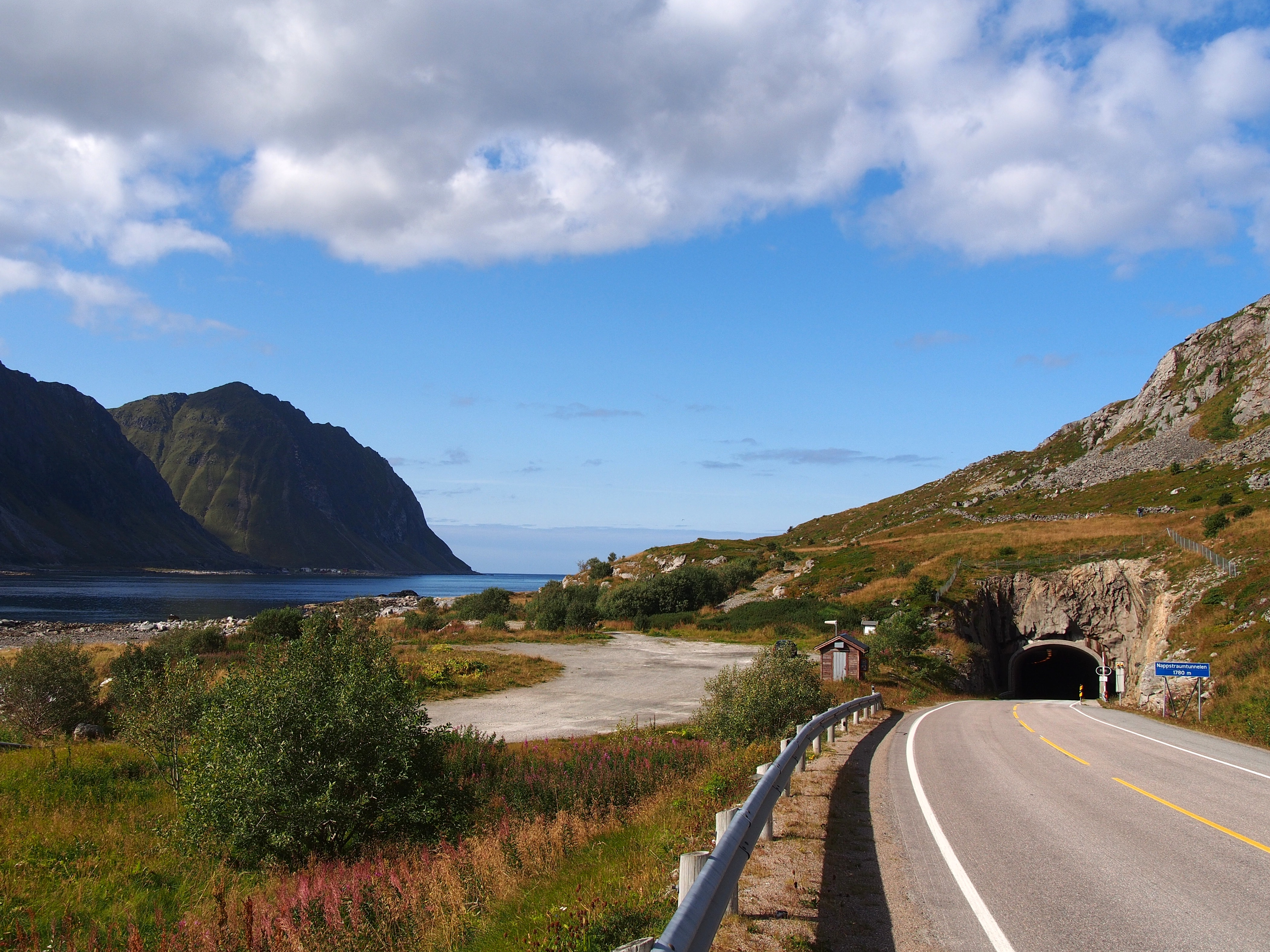 Nappstraumen Tunnel - 2013.08